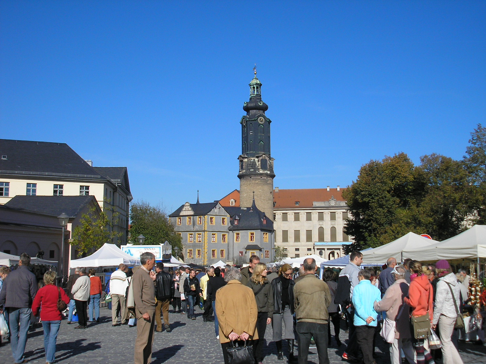 Auf dem Zwiebelmarkt in Weimar (Thüringen).